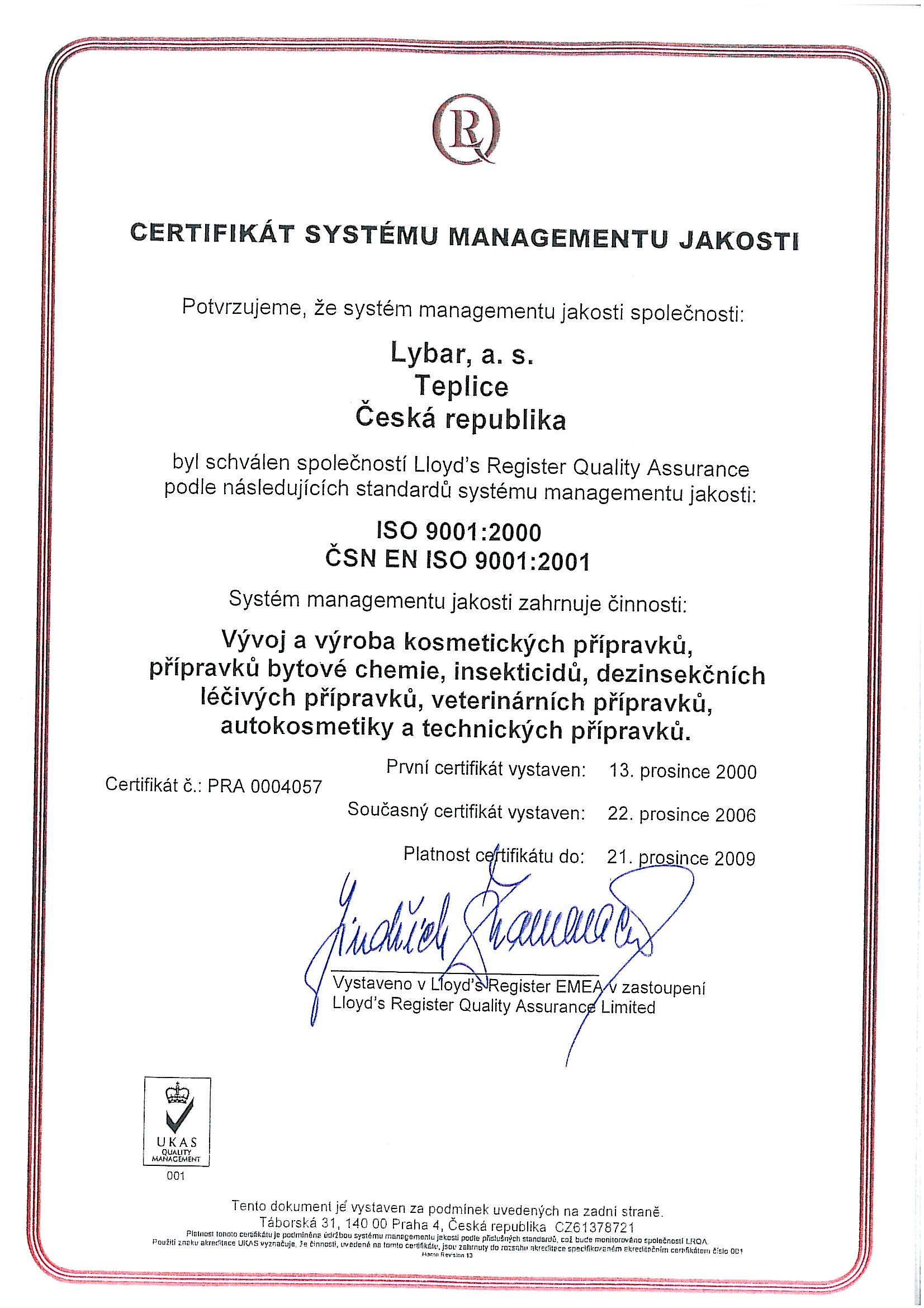 Certifikát ISO